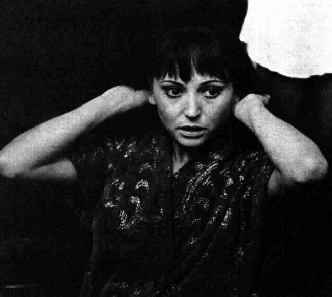 Italian actress Claudia Giannotti